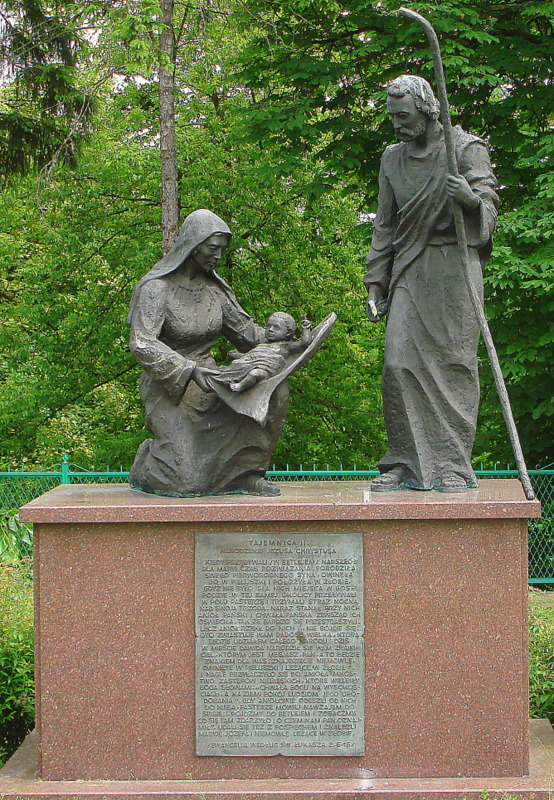 Częstochowa, zespół klasztorny paulinów na Jasnej Górze